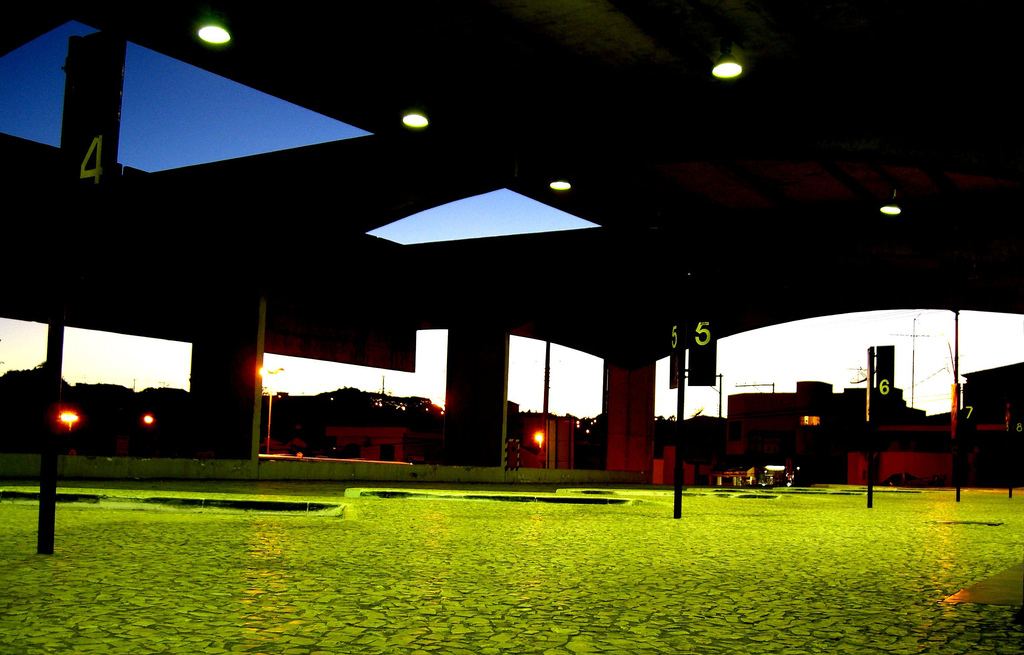 Estação Rodoviária de São Carlos